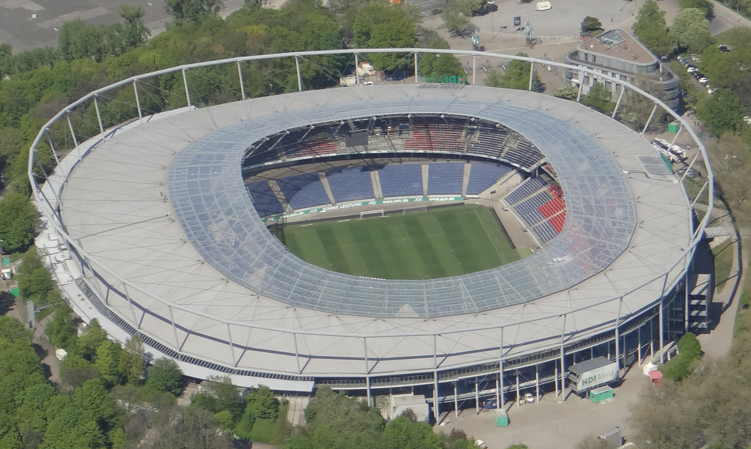 Luftbild HDI-Arena